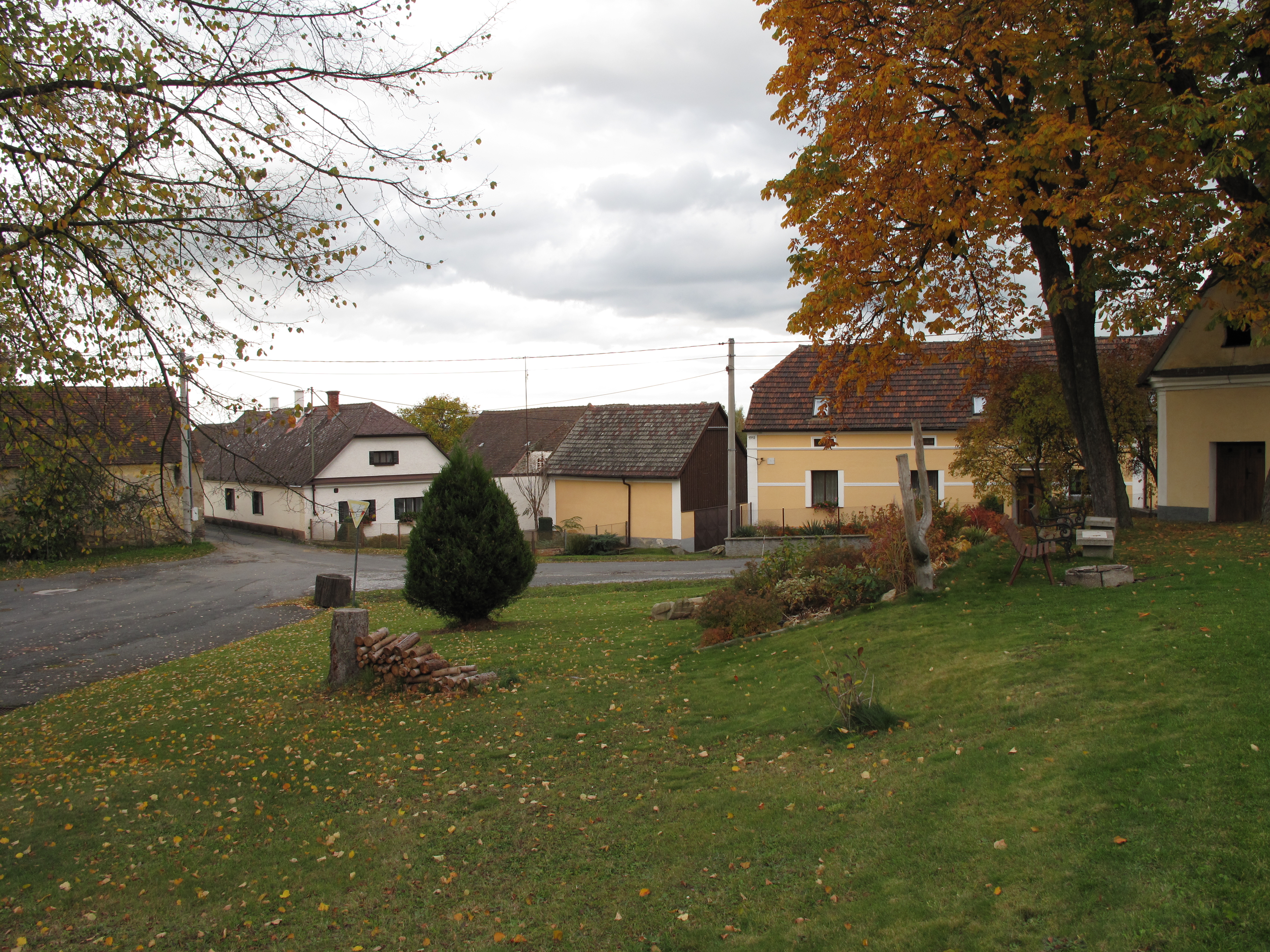 Kadešice. Okres Klatovy, Česká republika.